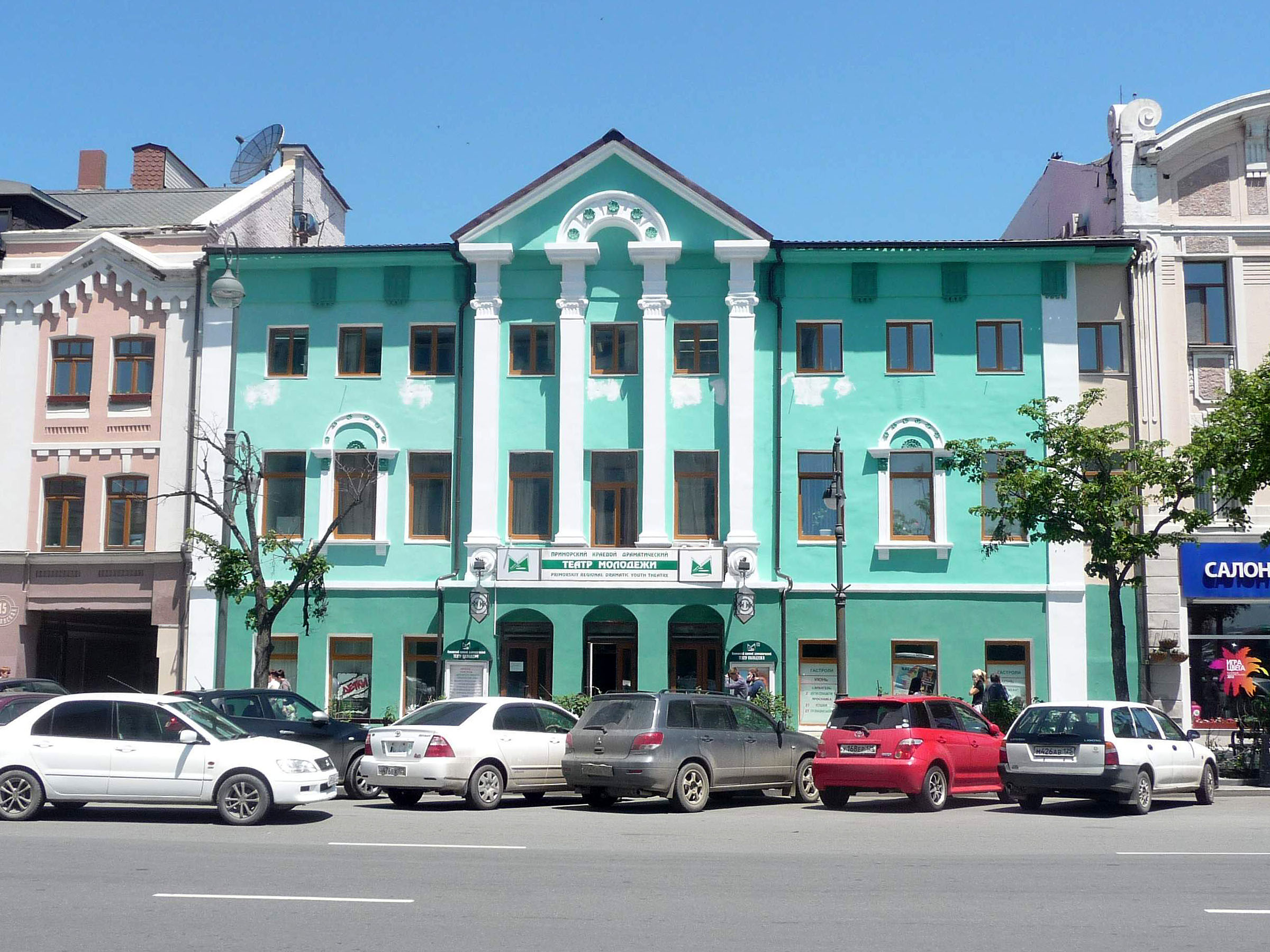 Владивосток, Светланская, 15-А, Театр молодёжи, 2012-06-22